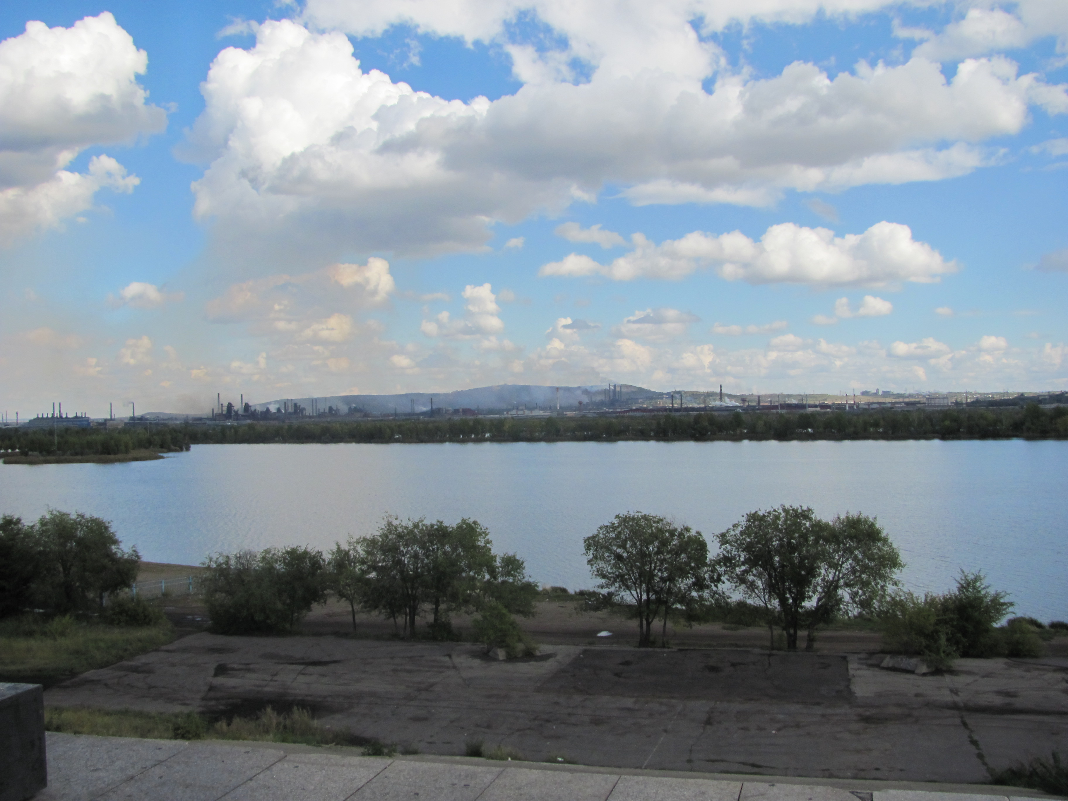 Панорама города Магнитогорска, фото снято с места, рядом с монумента Тыл - Фронту